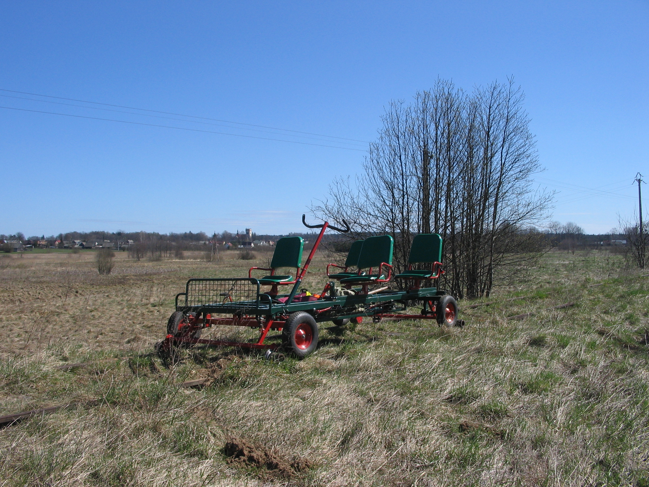 rowerowy pojazd szynowo-drogowy GS-02 Puszczańskiej Kolei Drezynowej na szlaku Białowieża Towarowa-Białowieża Pałac (w tle widoczna biała wieża kościoła rzymskokatolickiego)